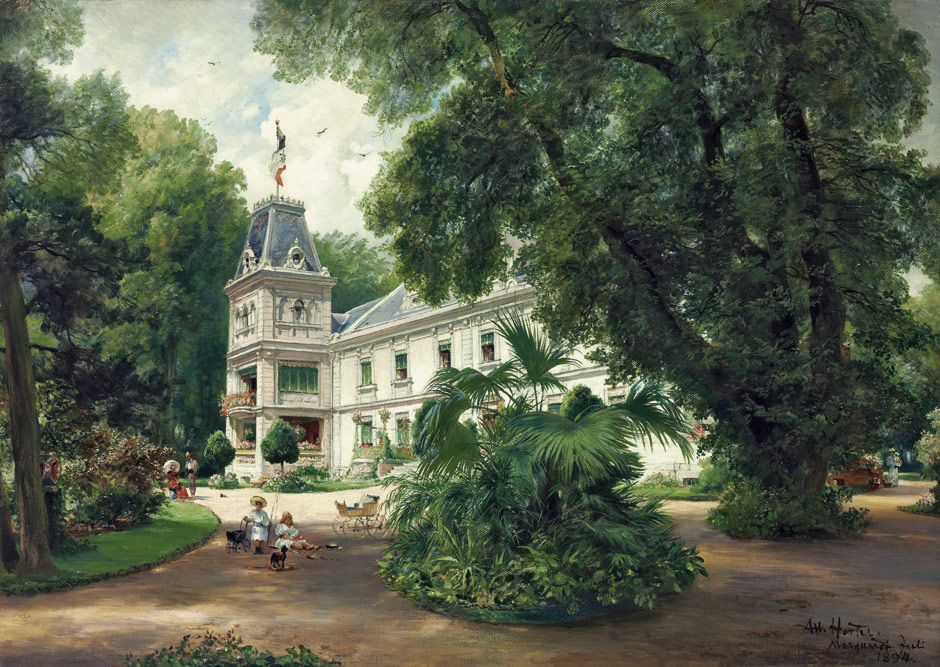 Schloß Marquardt bei Potsdam, im Vordergrund spielende Kinder. Öl auf Leinwand. 60,5 x 84 cm.